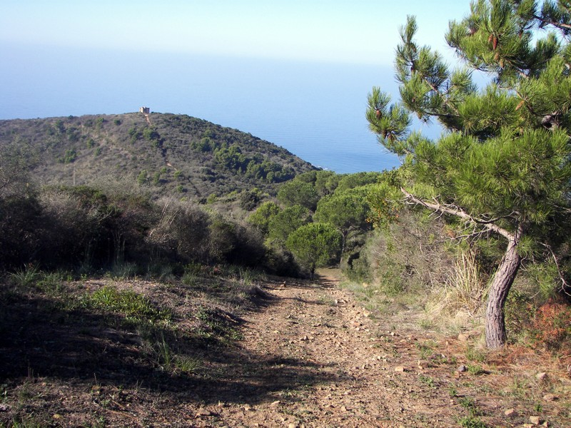 vedetta